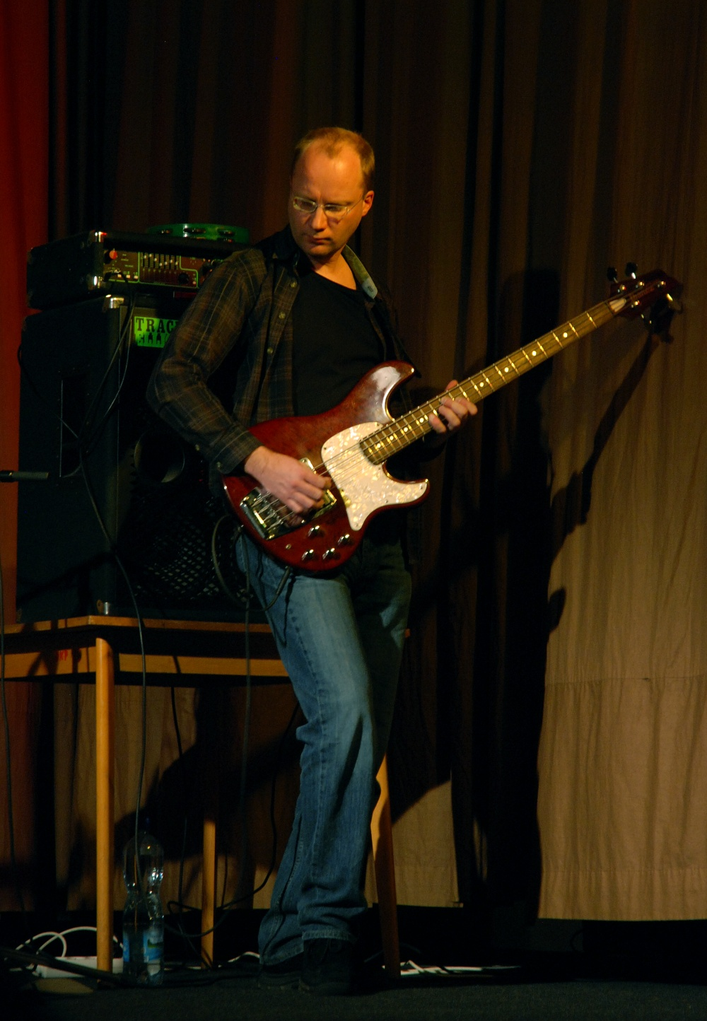 Luděk Horký, baskytarista skupiny Psí vojáci na koncertě v Loděnici